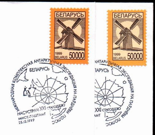 Почтовая марка Республики Беларусь (1999): разновидности по цвету. Спецгашение Международной комплексной антарктической экспедиции на Южный полюс.